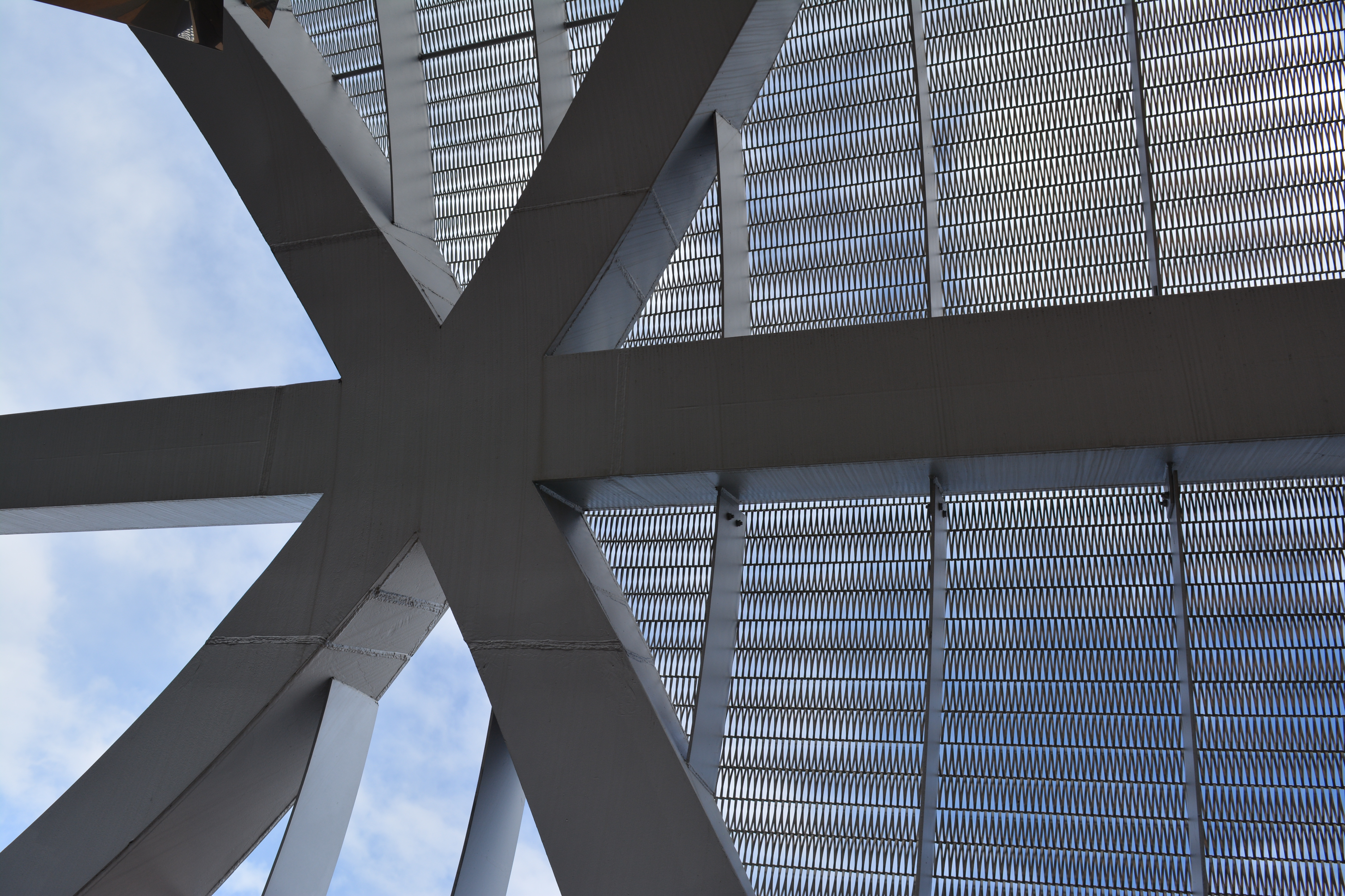 Detalle interior nudo